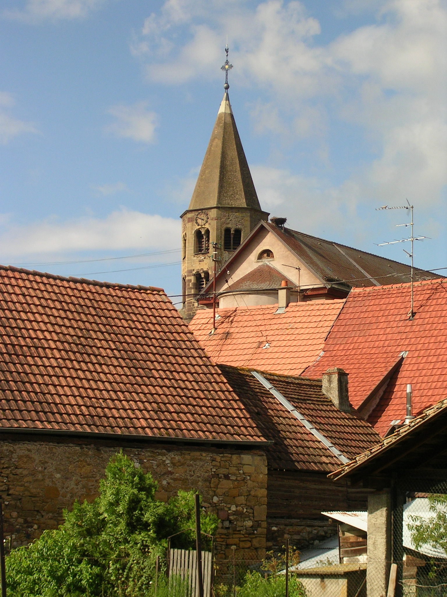 Clocher de l'église Saint-Agathe de Gundolsheim.